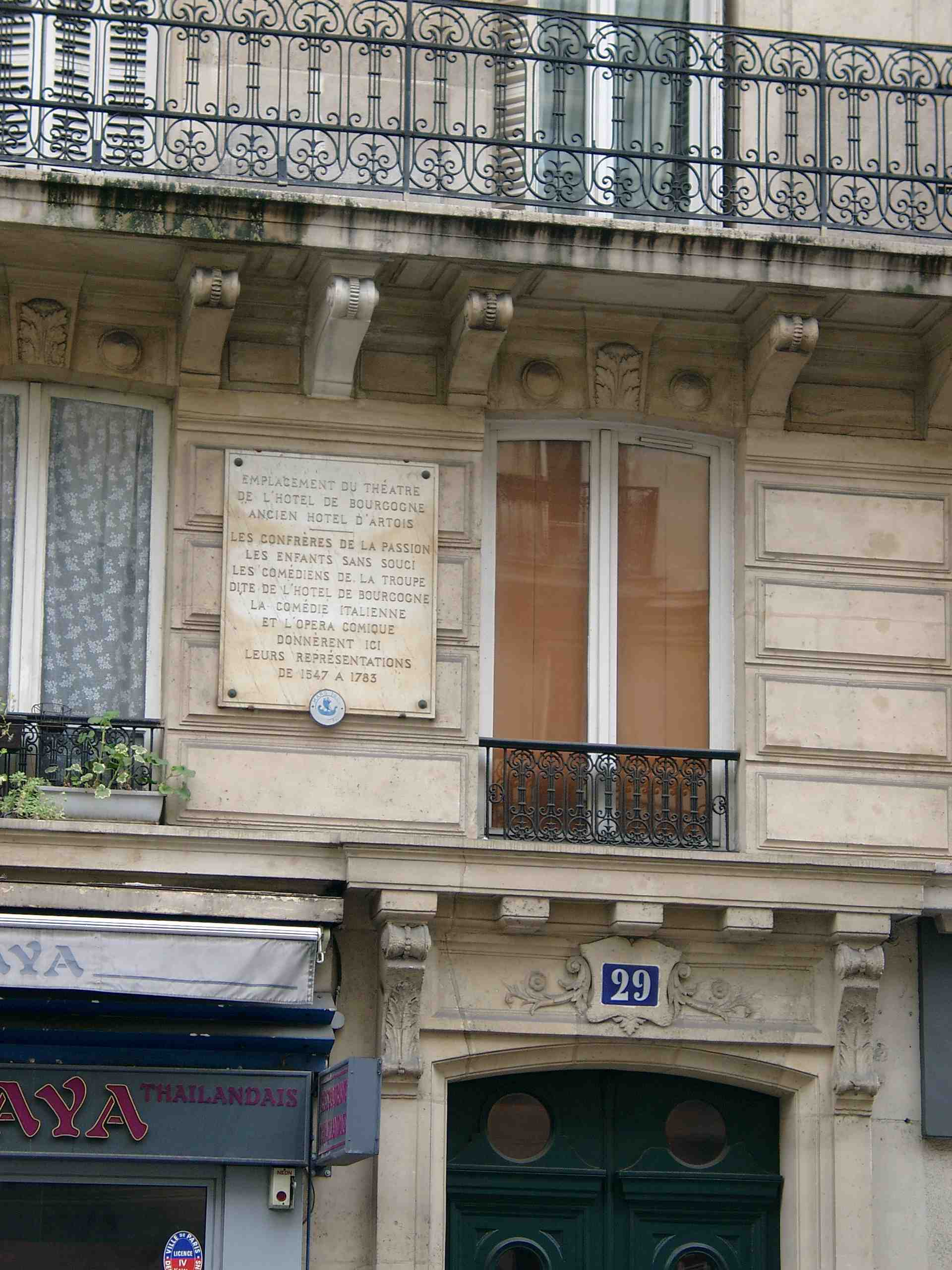 Paris, Plaque à l'emplacement de l'ancien Théâtre de l'hôtel de Bourgogne, 29 rue Etienne Marcel, Ier arrondissement, Paris, France.